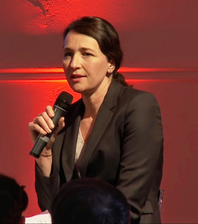 Silja Vöneky, German ethicist